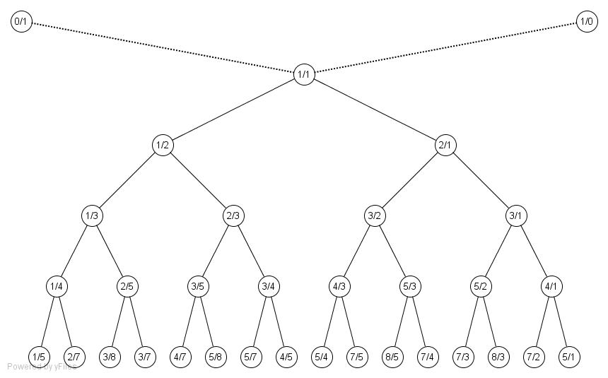 Arbre de Stern-Brocot tronqué à l'étape 4 Auteur : WydD sur le logiciel de conception de graphe yEd Graph Editor (libre).